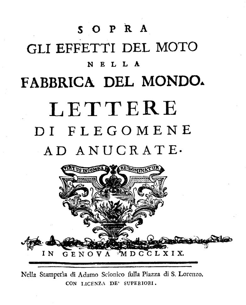 Sopra gli effetti del moto nella fabbrica del mondo. Lettere di Flegomene ad Anucrate. - In Genova : nella stamperia di Adamo Scionico sulla piazza di S. Lorenzo, 1769. - XX, 318, [2] p. ; 4º .